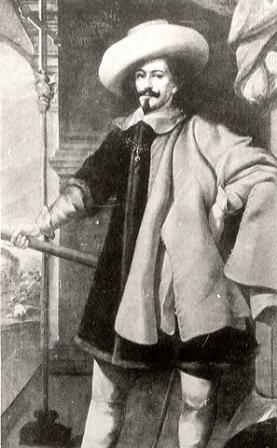 Il conte di Busto Arsizio Paolo Camillo Marliani, morto nel 1758.